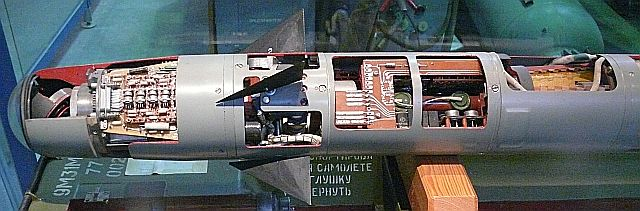 SA-9, eigenes Bild